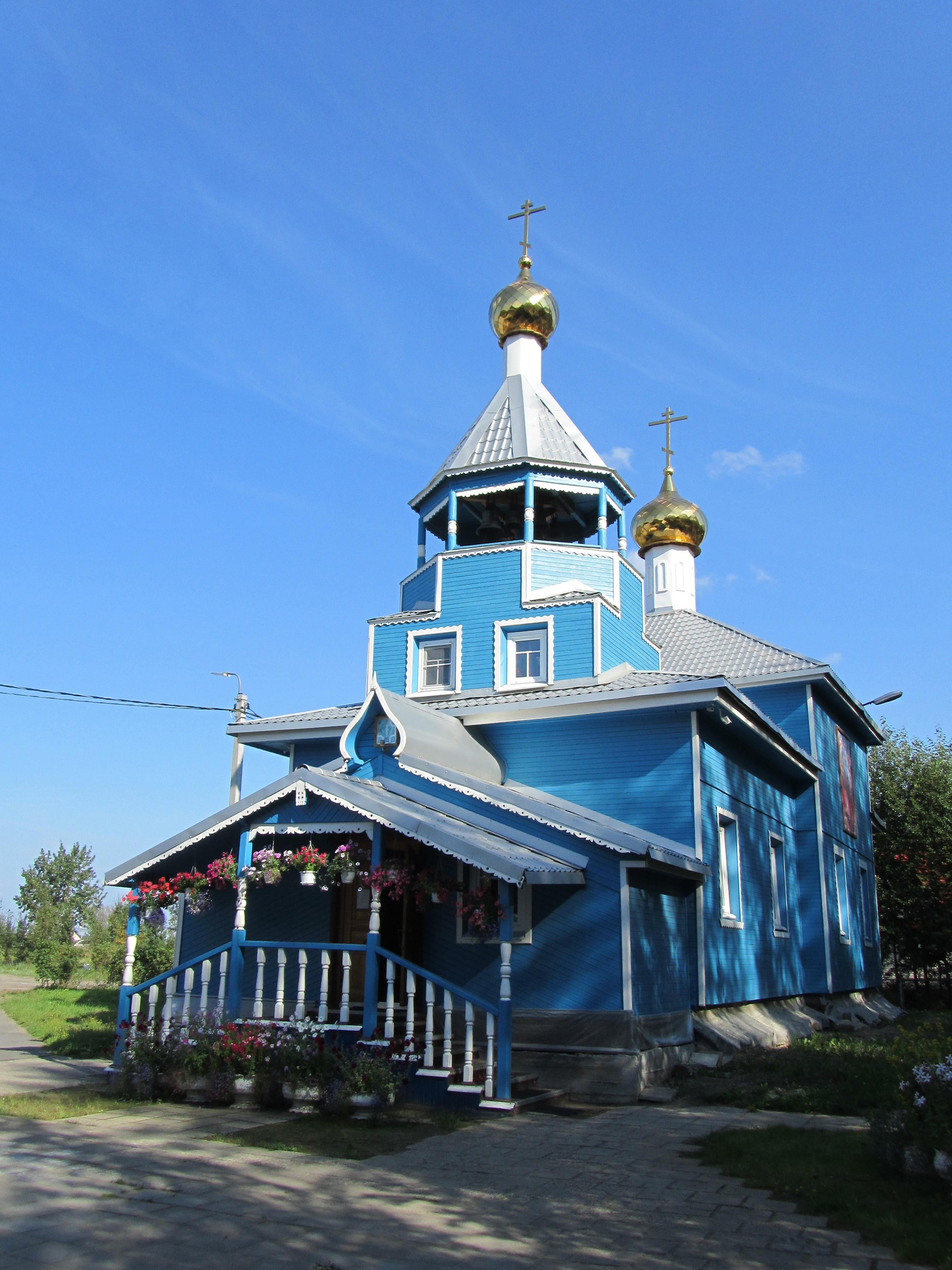 Северодвинск. Ягринская церковь.